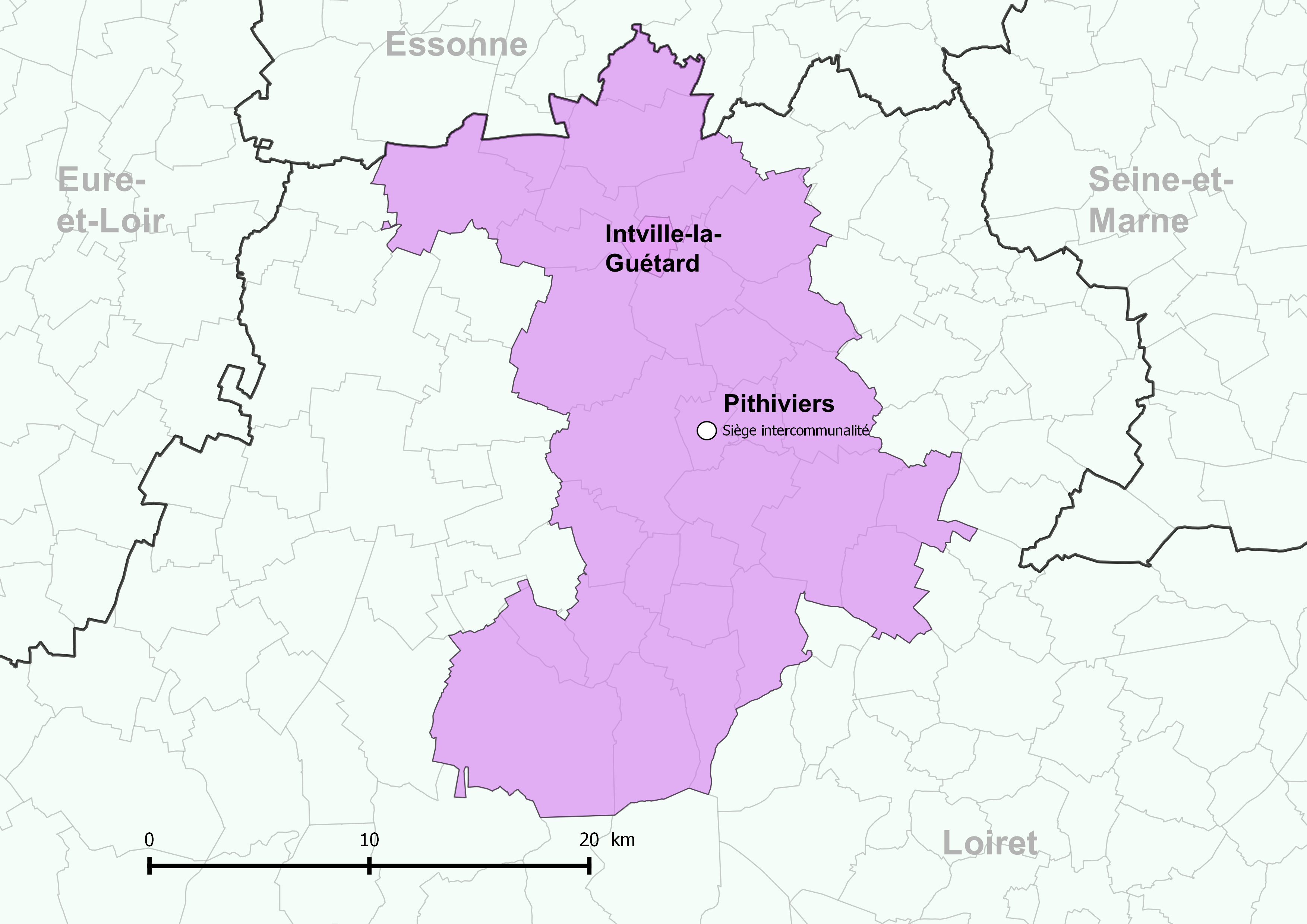 Périmètre de la communauté de communes du Pithiverais - Positionnement de la commune d'Intville-la-Guétard.